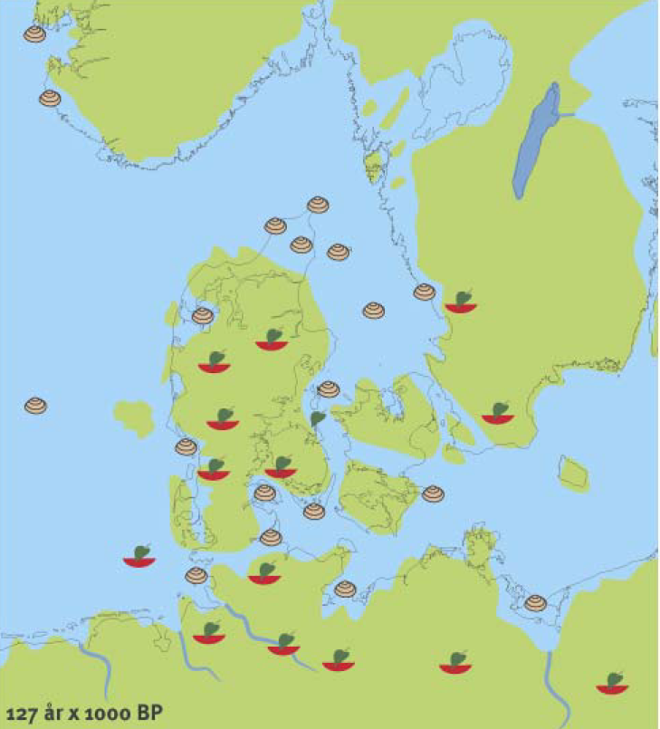 Danmarks udseende for 127.000 år siden (Eem mellemistid)